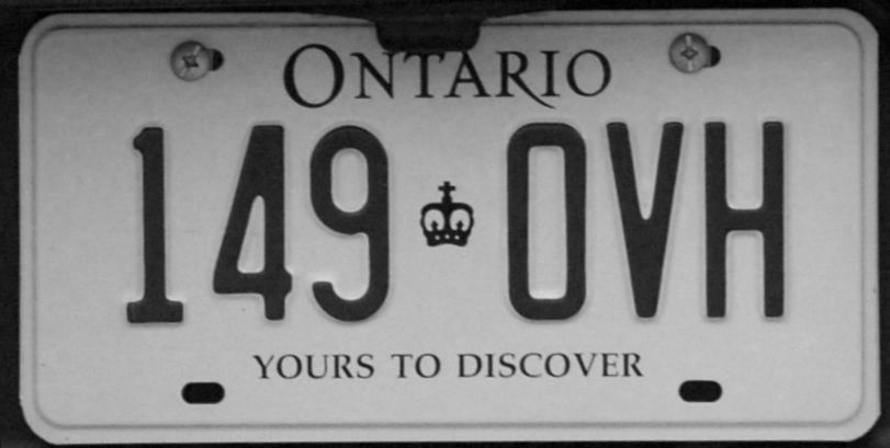 Plaque d'immatriculation de l'Ontario/1996 commercial Ontario license plate